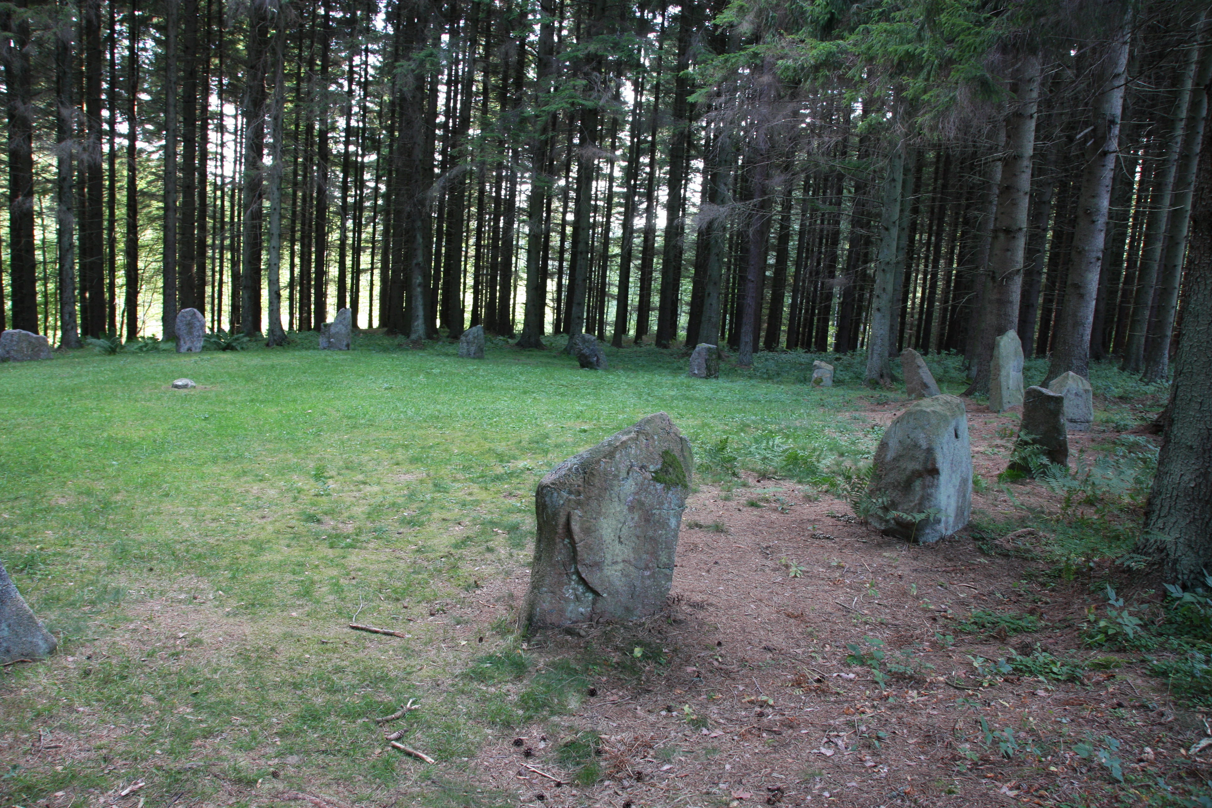 Domarringen vid Åbrått i Tanums kommun er hela 18 meter i diameter, en av dom största i distriktet. Tanums kommun, Bohuslän.